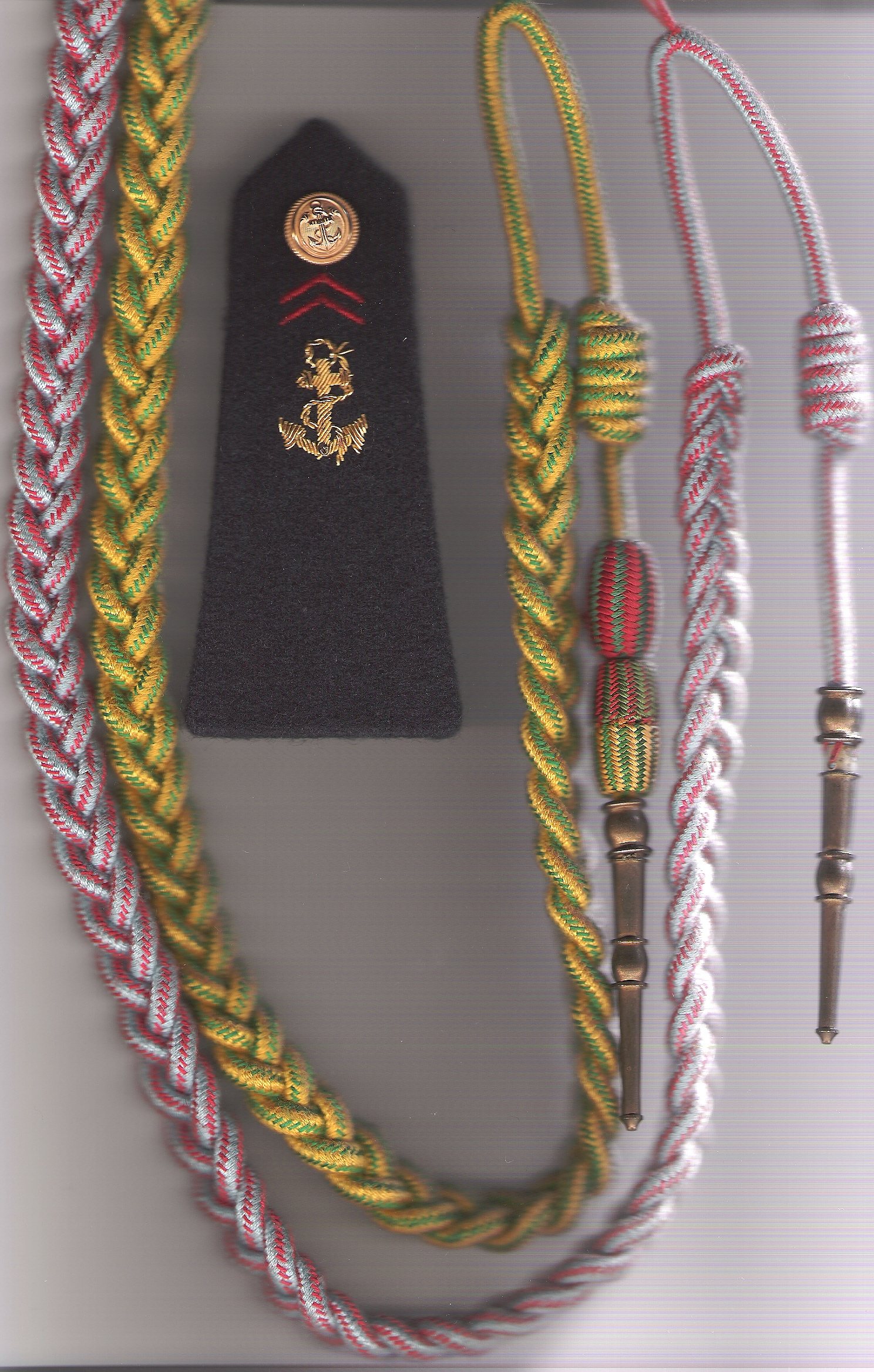 Description fourragère aux couleurs de la médaille militaire avec olives de la croix de guerre (1914-1918) (1939-1945), puis aux couleurs T.O.E. (du 21e R.I.Ma). Date1980Sourcefourragère personnelle puis épaulette (que j'ai porté)Authorfantassin 72Permission (Reusing this file) libre de droits fourragère aux couleurs de la médaille militaire avec olives de la croix de guerre (1914-1918) (1939-1945), puis aux couleurs T.O.E. (du 21e R.I.Ma).